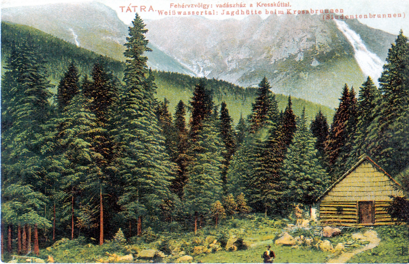 V Doline Bielej vody vo Vysokých Tatrách, na Slovensku na Žeruchovej poľane postavil v roku 1903 Uhorský karpatský spolok útulňu. v roku 1923 už neslúžila turistom.